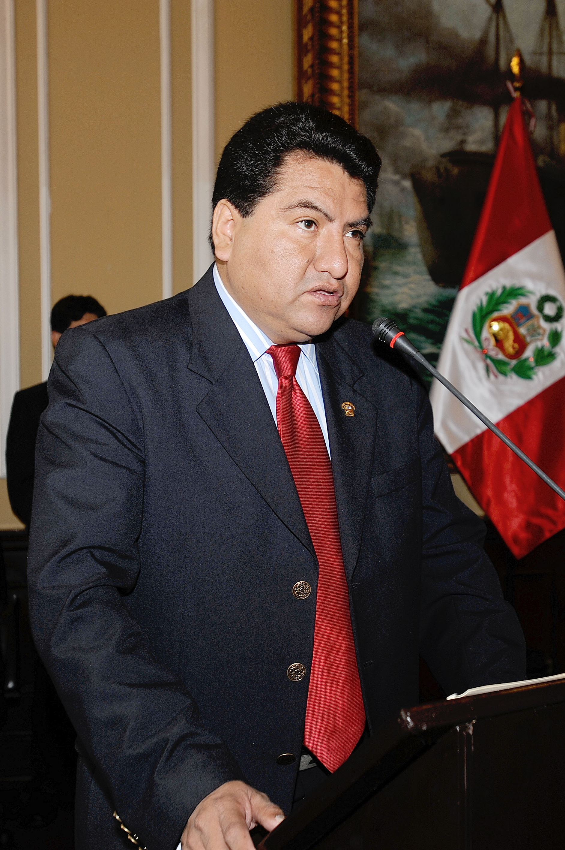 El congresista Aníbal Huerta Díaz presidió en horas de la mañana un foro sobre la ley marco de tributación ambiental. El evento fue realizado en la Sala Grau del Palacio Legislativo.